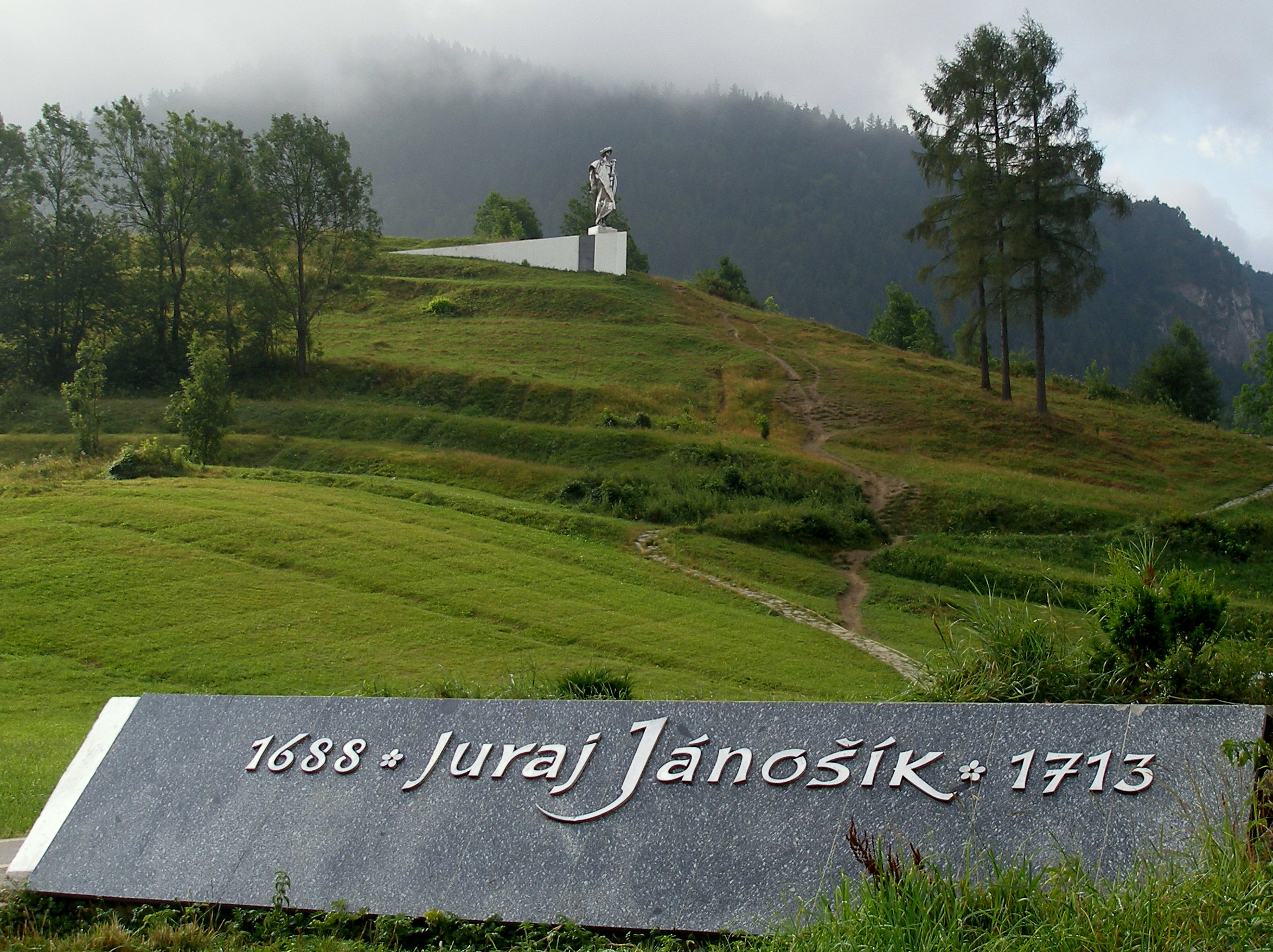 Rázovitá slovenská obec Terchová,návršie s monumentálnou sochou ľudového slovenského hrdinu Juraja Jánošíka. Autor monumentu J.Kulich rok 1988.